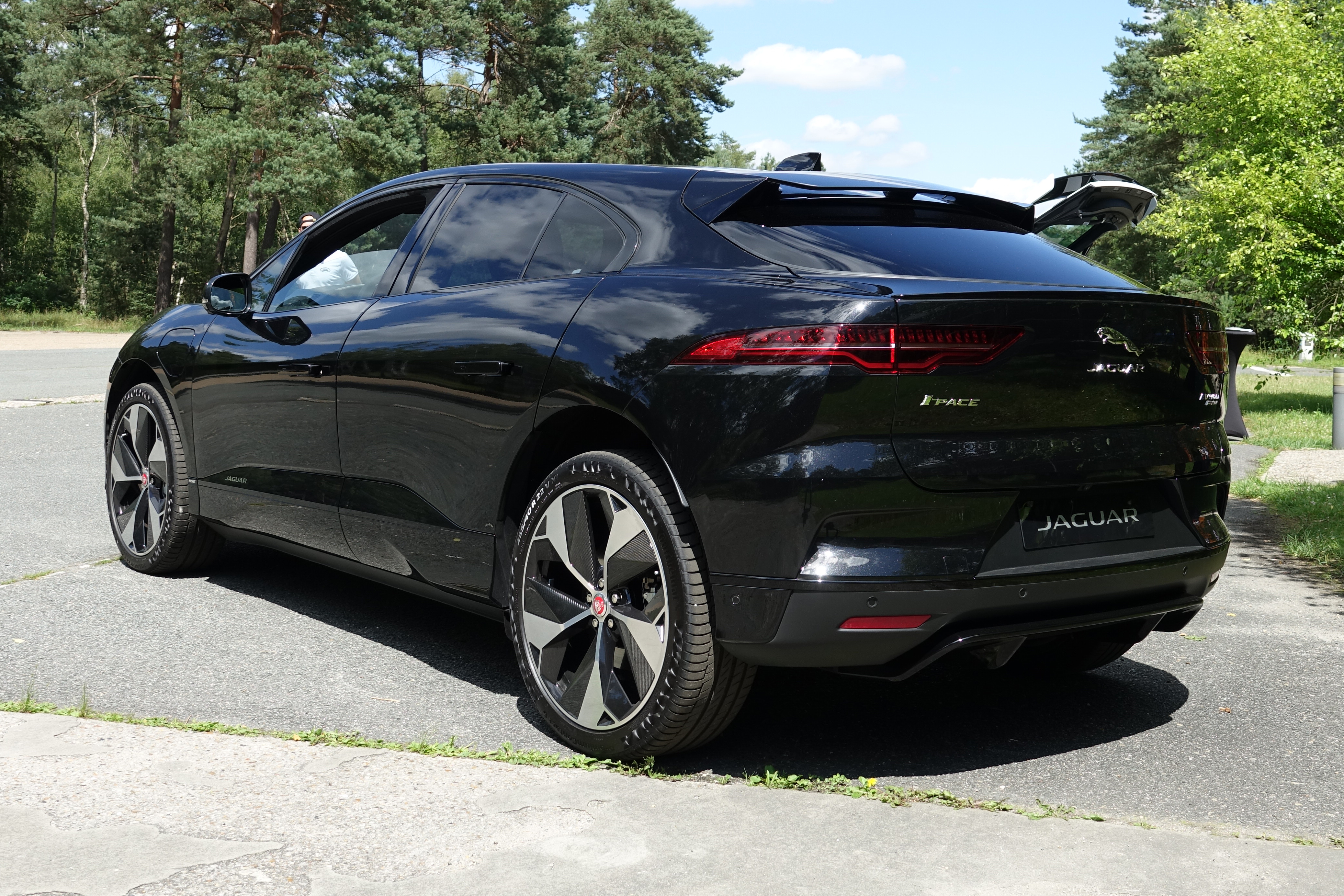 Jaguar I-Pace à Mortefontaine